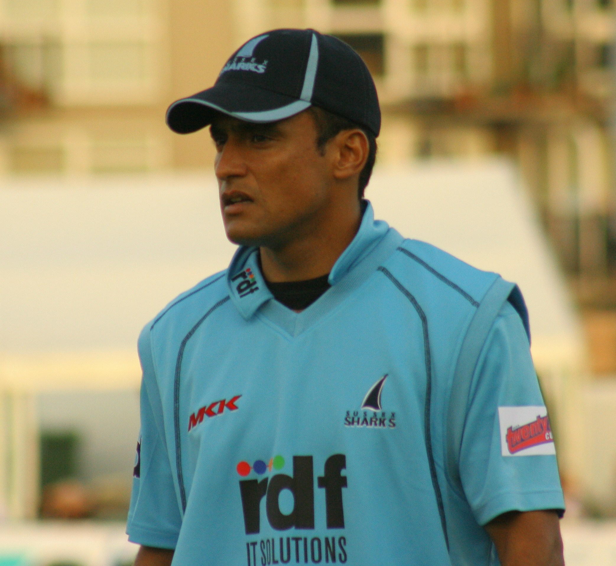 Yasir Arafat